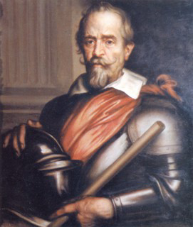 Álvaro de Bazán y Benavides (1571 - 1646), II Marqués de Santa Cruz, retratado por Antoon van Dyck.